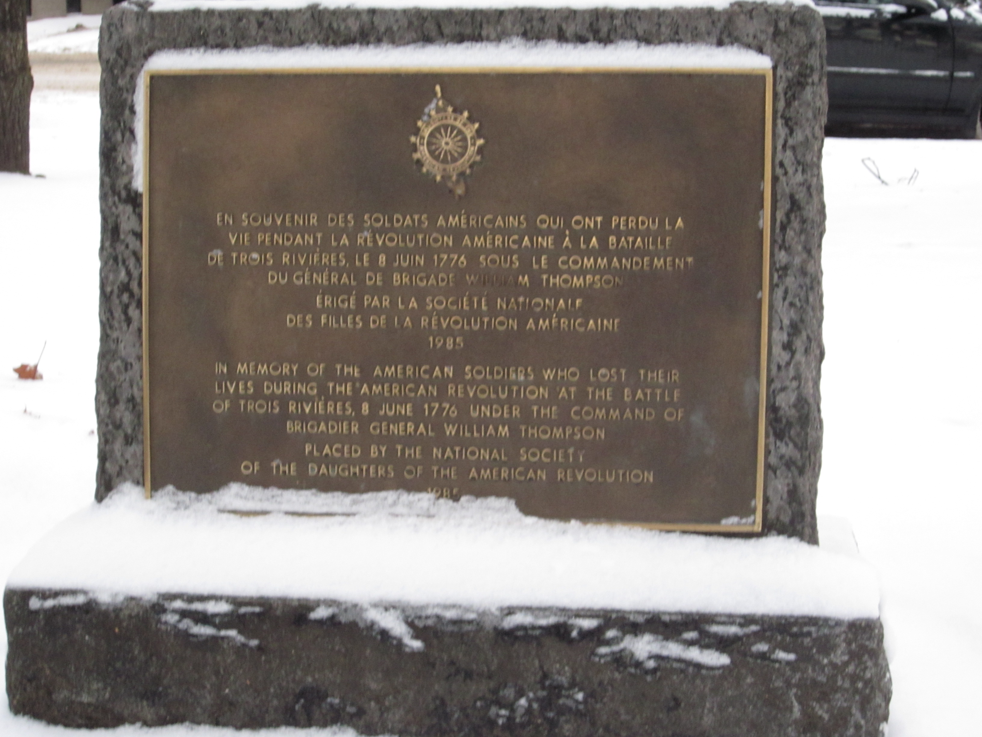 Plaque de la société des Filles de la Révolution américaine sur la bataille de Trois-Rivières